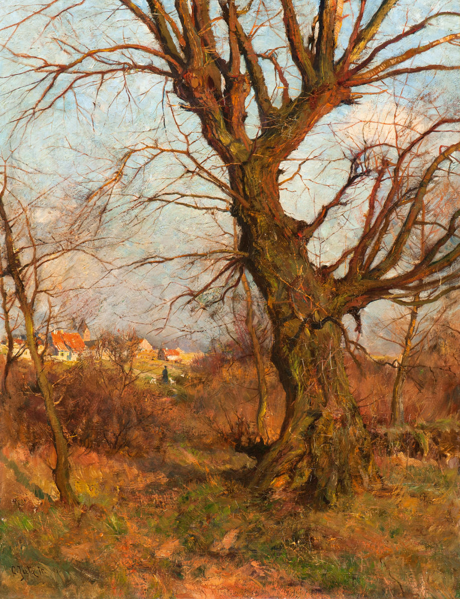 Herbstliche Landschaft mit einem Dorf im Hintergrund. Öl auf Leinwand. Signiert und (19)03 datiert. 70 x 54 cm